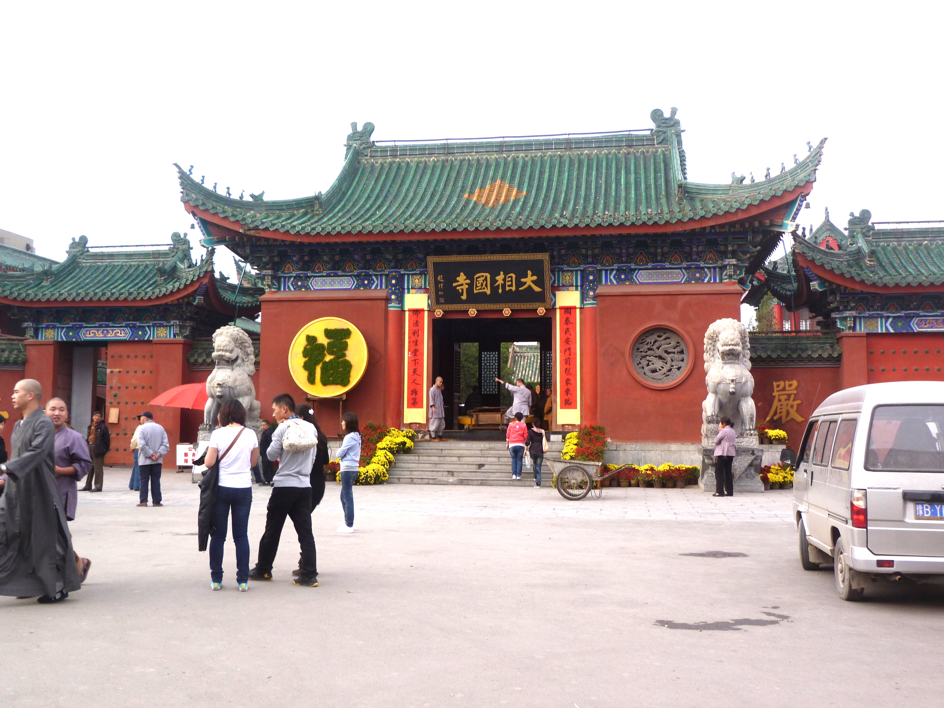 开封大相国寺